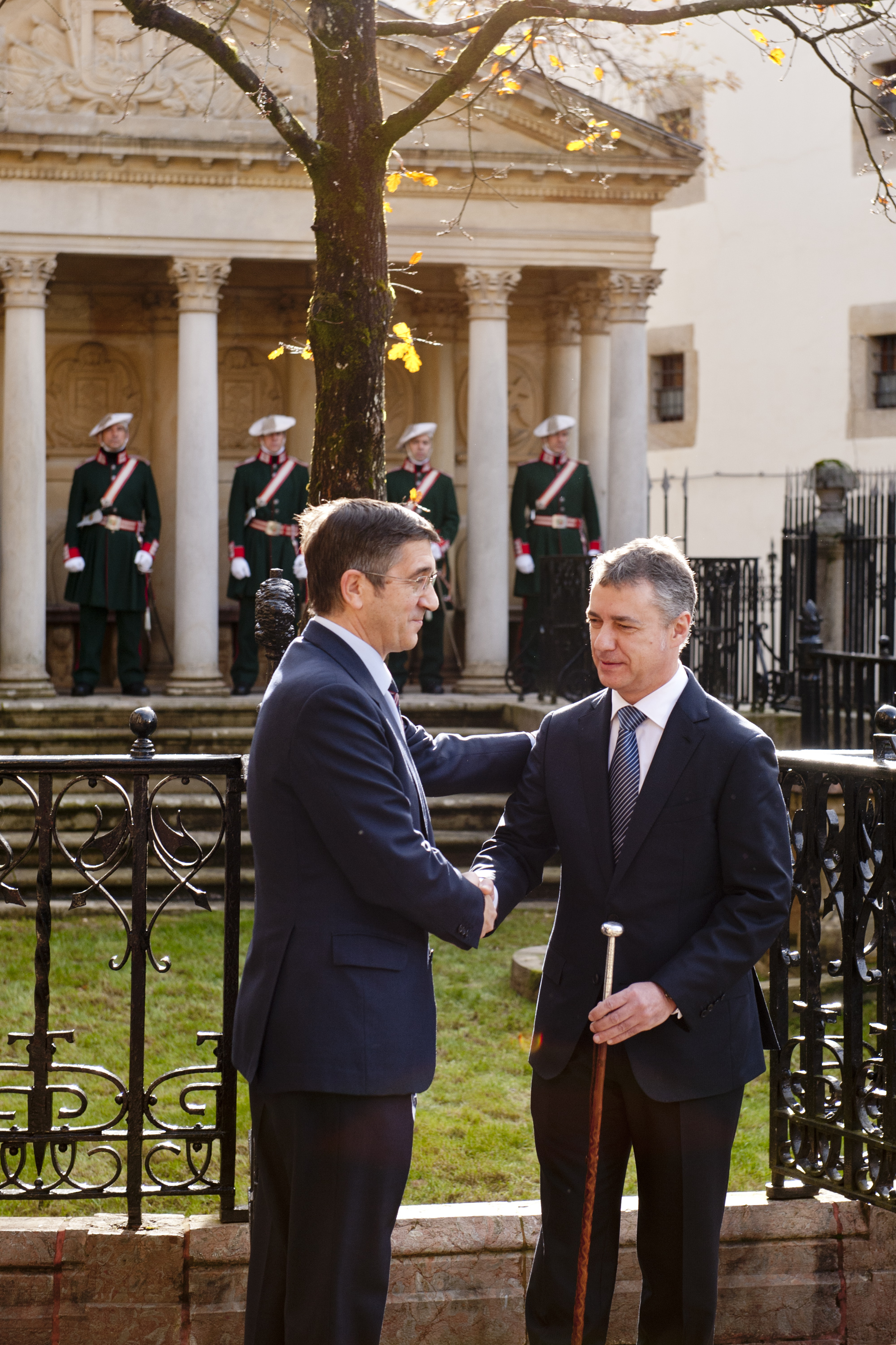 El lehendakari Iñigo Urkullu jura su cargo ante el árbol de Guernica